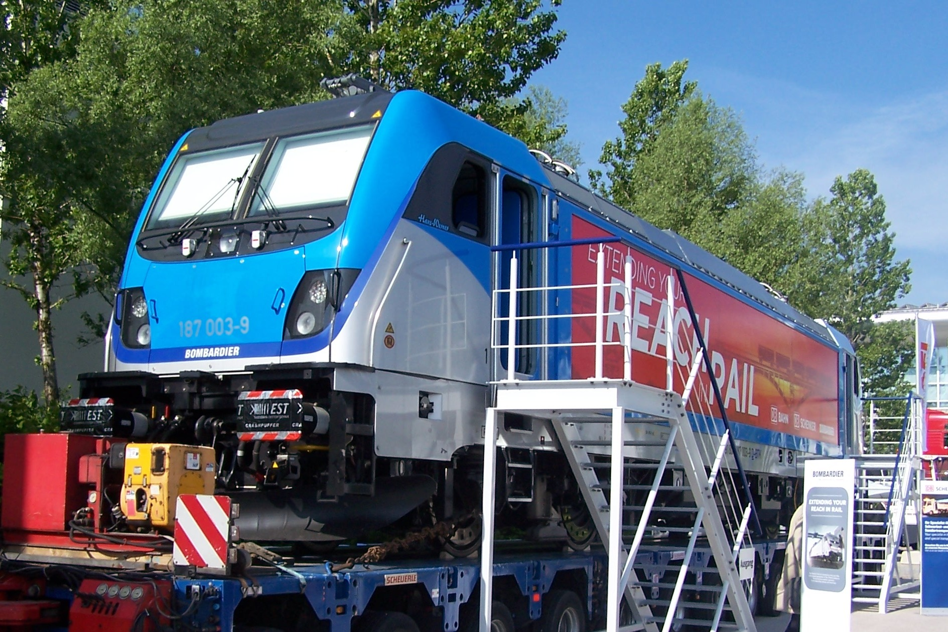 Bombardier TRAXX 3, 187 003, auf der Transport Logistic in München auf einem Tieflader.